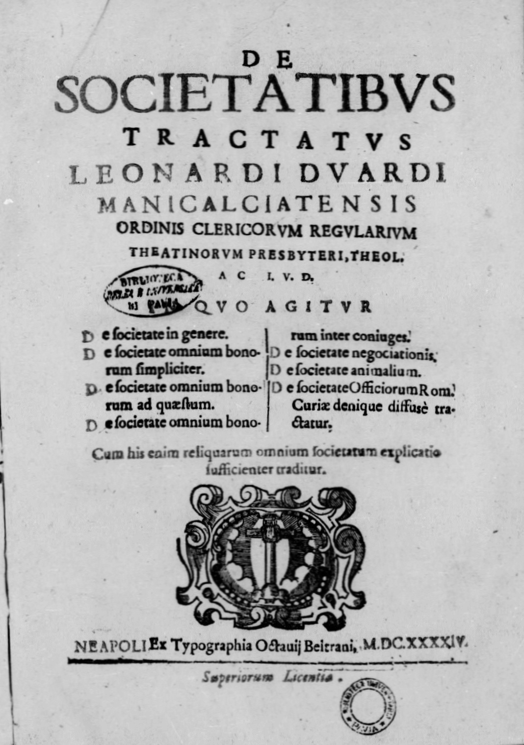 Frontespizio